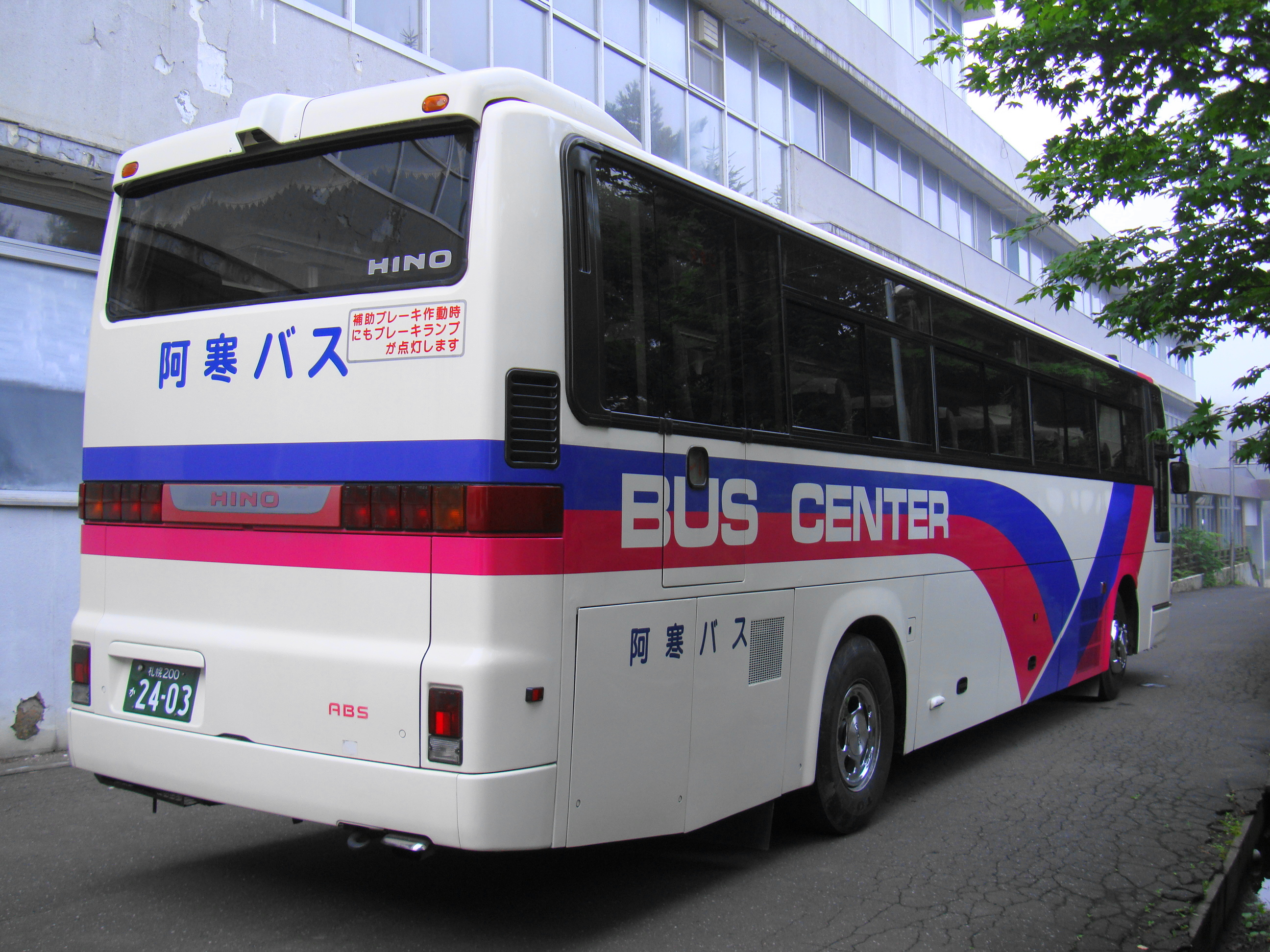 BUS CENTER